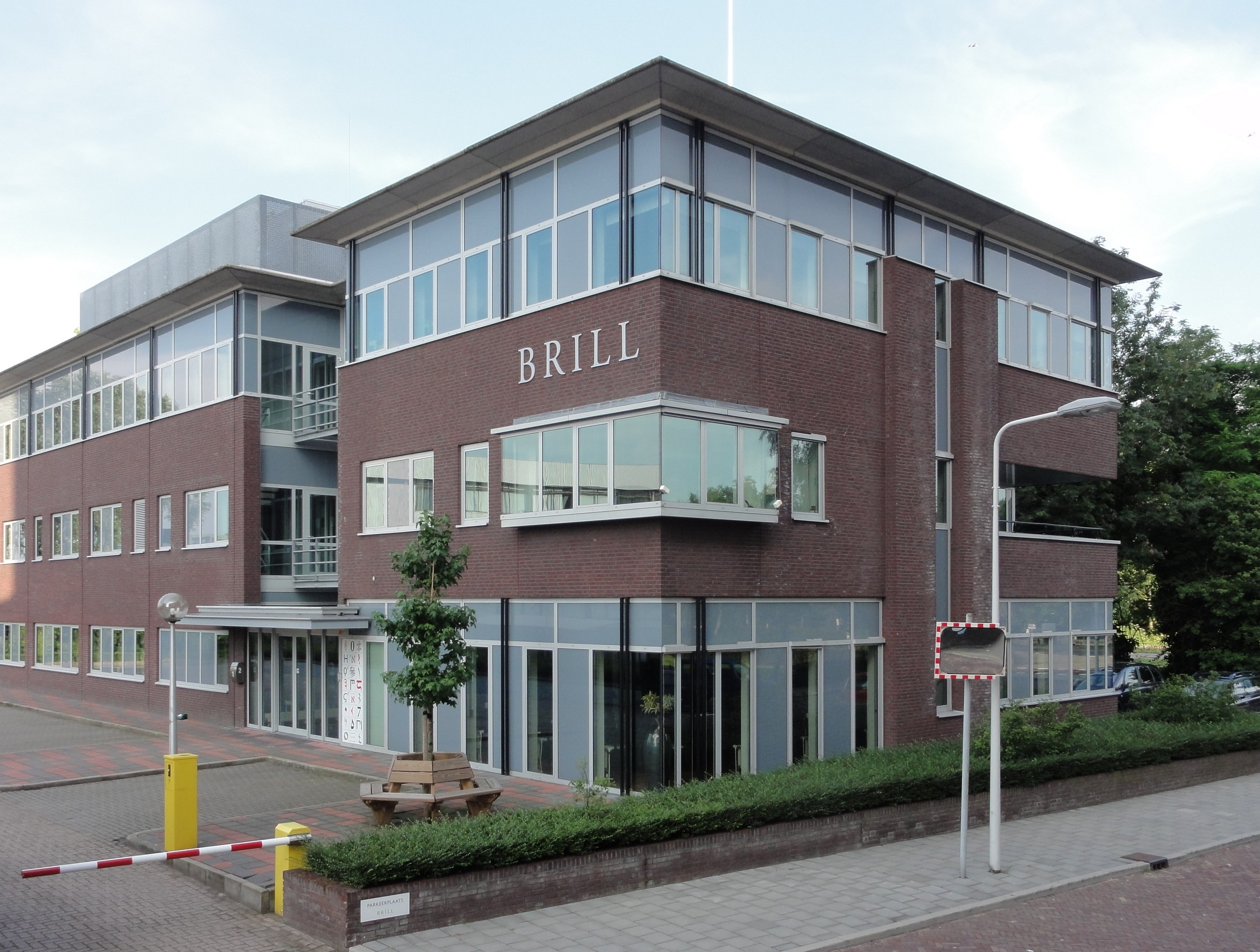 Kantoorgebouw Brill, Plantijnstraat 2, 2321 JC Leiden, The Netherlands